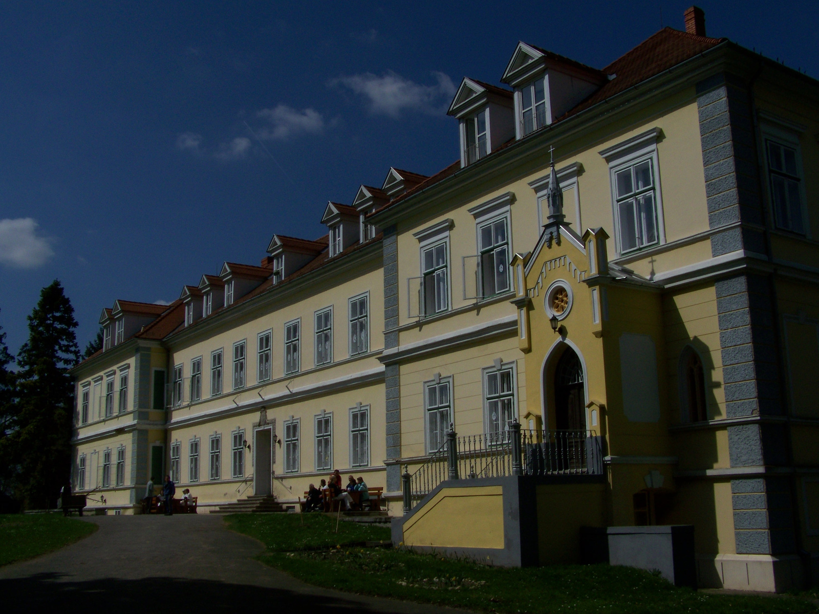 v. Sigray-kastély (Ivánc, Kossuth Lajos utca 1-9.) This is a photo of a monument in Hungary, Identifier: 8938